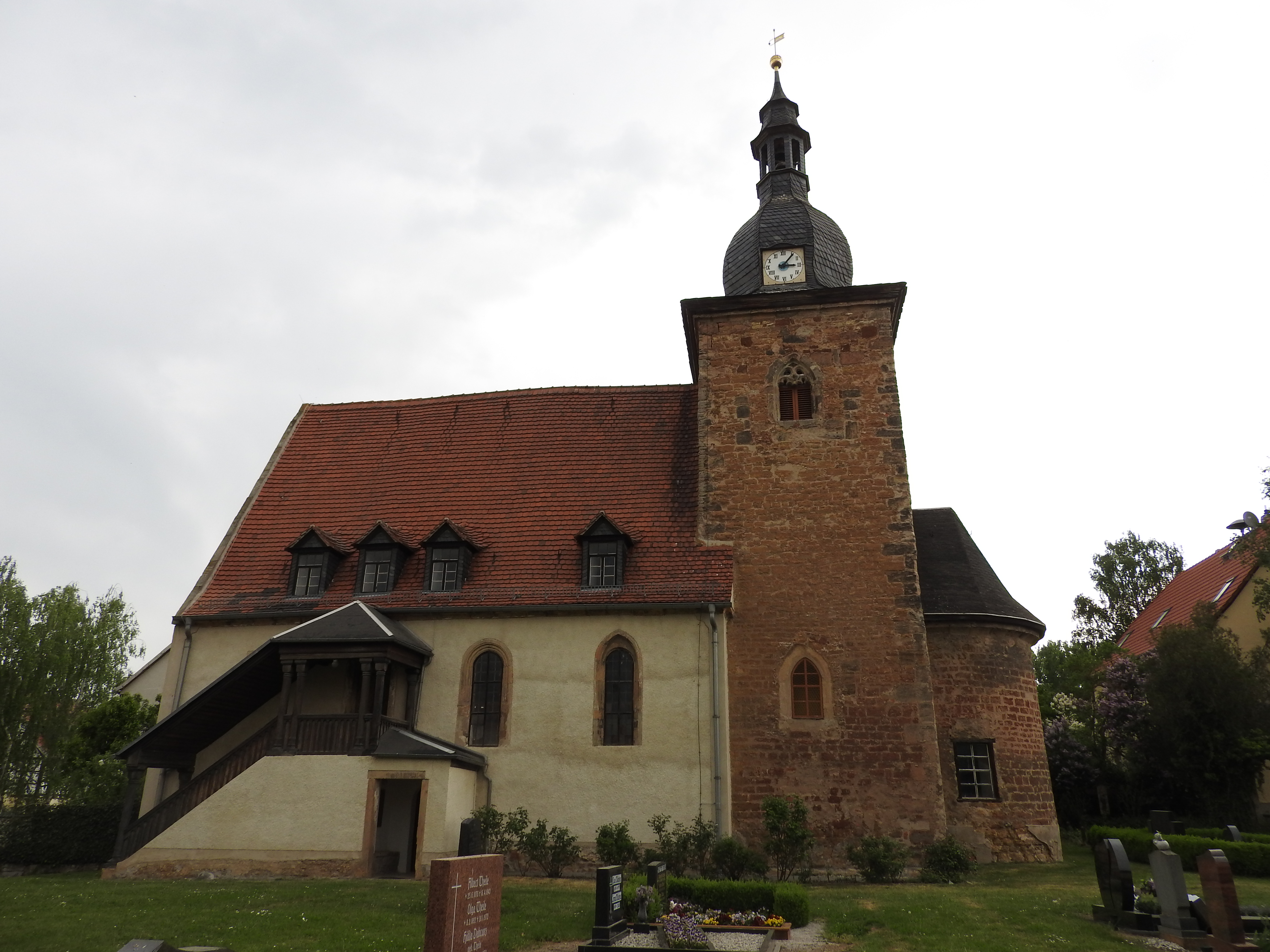 Kirche in Teutleben, Eßleben-Teutleben, Thüringen